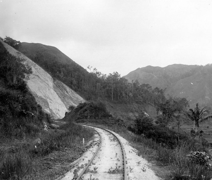 Negatief. Aanleg van de spoorlijn tussen Soengei Lassi en Siloengkang aan de westkant van Sumatra.. Aanleg van de spoorlijn tussen Soengei Lassi en Siloengkang aan de westkant van Sumatra